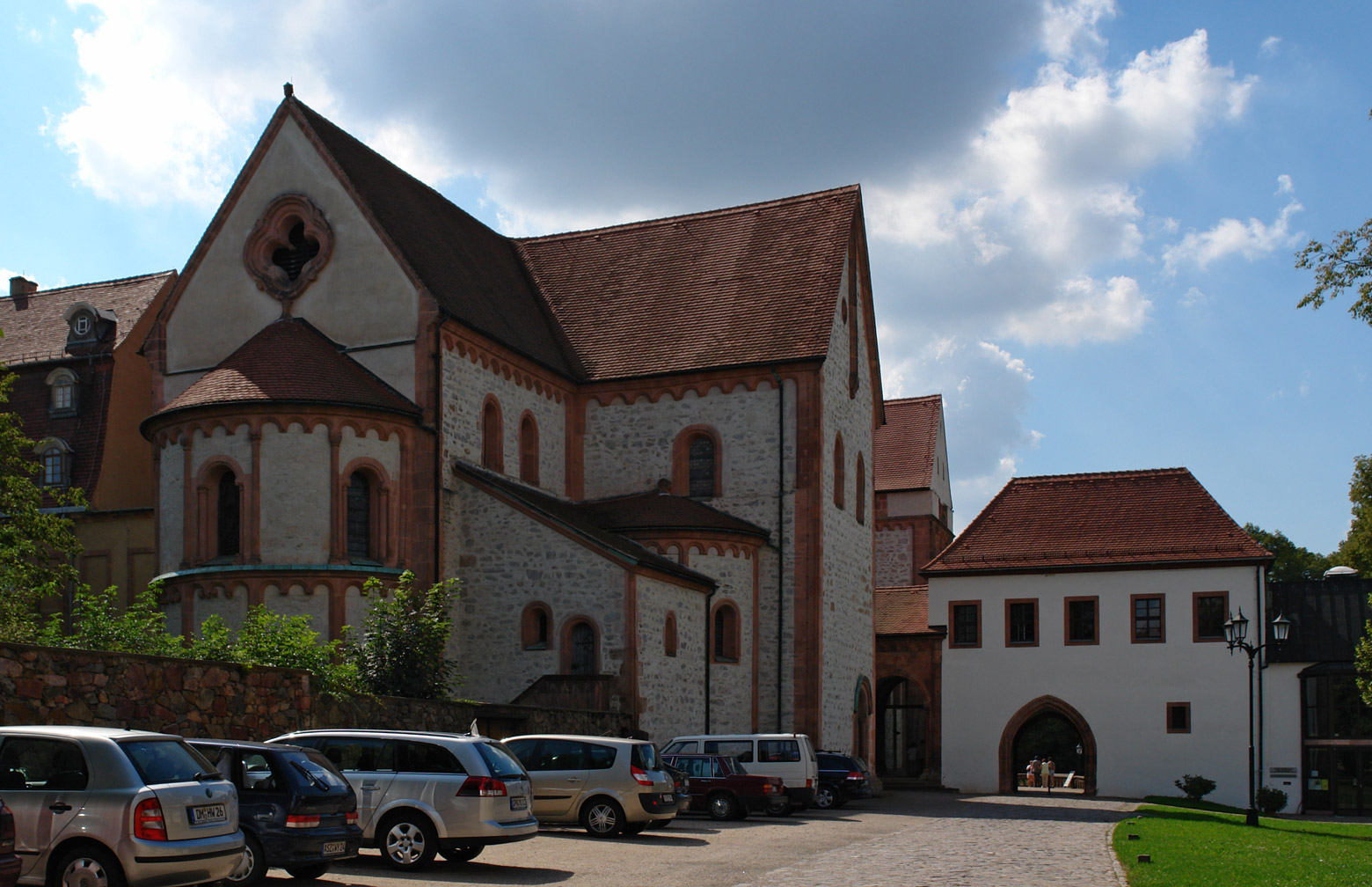 Klosteranlage Wechselburg mit romanischer Basilika